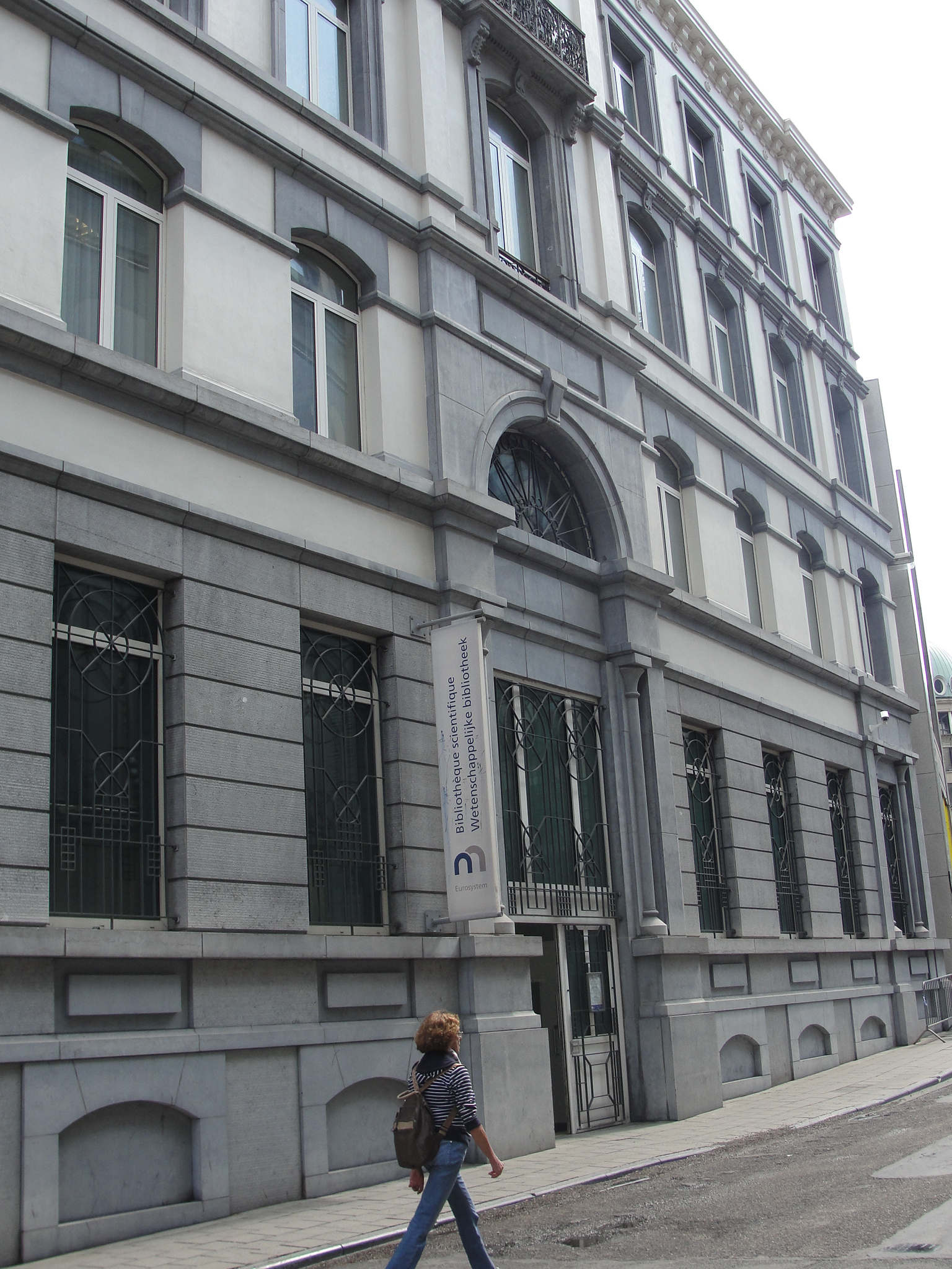 Voormalig bankgebouw van de Union du Crédit belge in de Warmoesberg 57, Brussel. Gebouwd in 1872 door D. De Keyser in eclectische stijl. Thans is hier de wetenschappelijke bibliotheek van de Nationale Bank van België gevestigd.